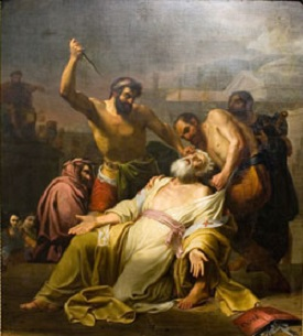 Martirio di San Eutichiano, olio su tela, Cattedrale di Sarzana